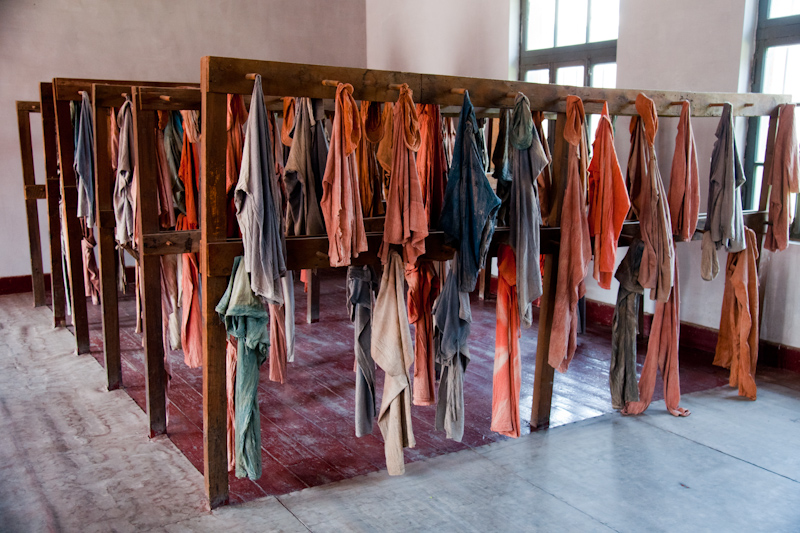 Das ehemalige Russisch-Japanische Lüshun Gefängnis: Durchsuchungsraum